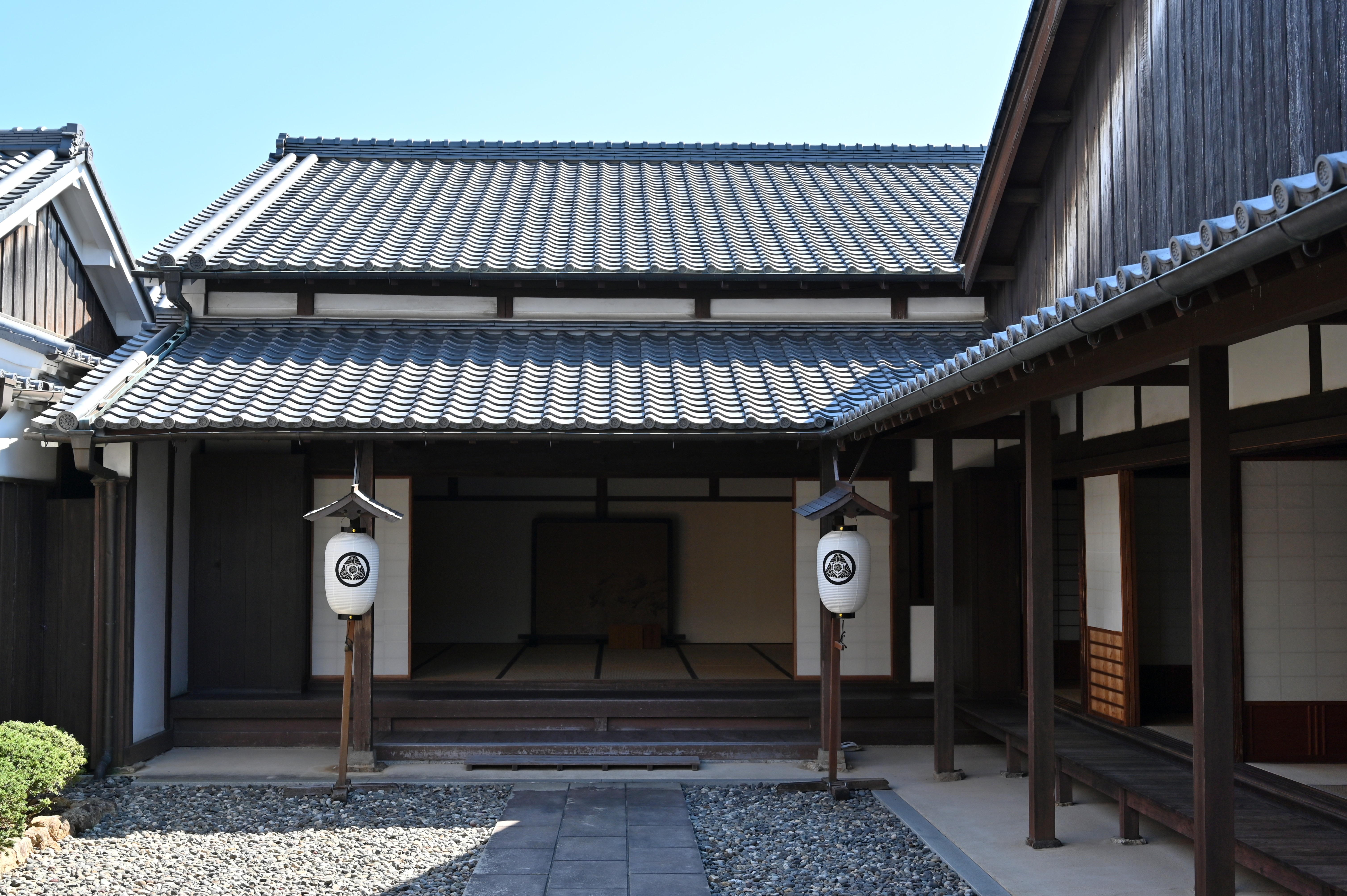 二川宿本陣資料館の本陣玄関